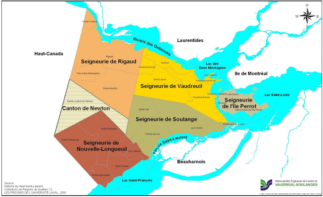 1700-1855 - Seigneuries Vaudreuil-Soulanges